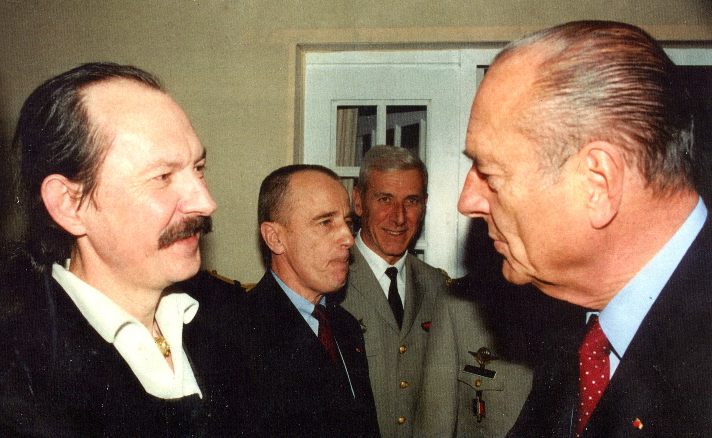 A l'occasion du Bicentenaire 1802-2002 des Ecoles de Saint-Cyr , l'auteur de BD René Le Honzec a été sollicité pour réaliser un album retraçant cette histoire. Le Président Chirac s'est vu offrir à l'inauguration de l'Année du Bicentenaire une planche originale de la BD par les Élèves et en a remercié personnellement l'auteur invité à l'Ecole de Guerre à Paris en janvier 2002.